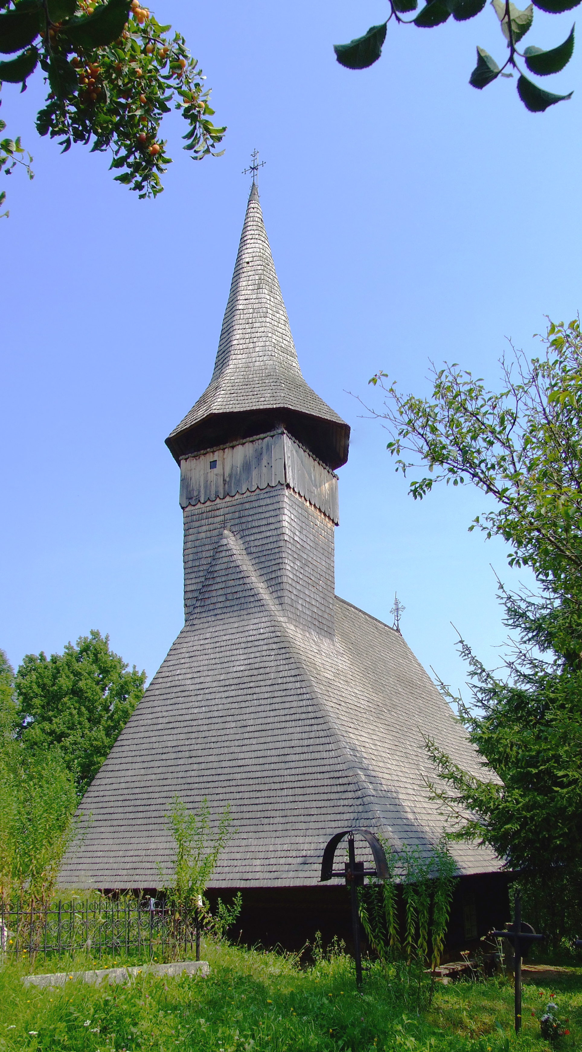 Biserica de lemn din Sârbi Susani, judeţul Maramureş.